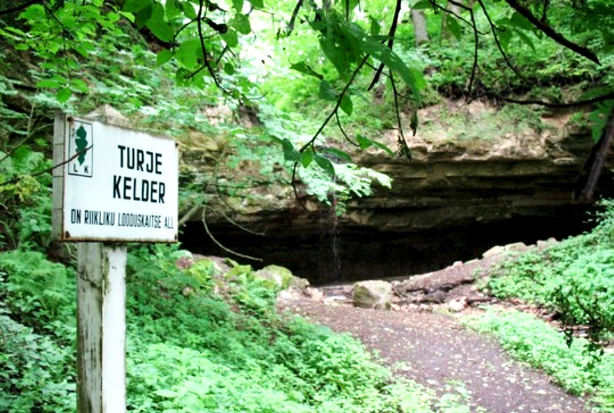 Turje kelder